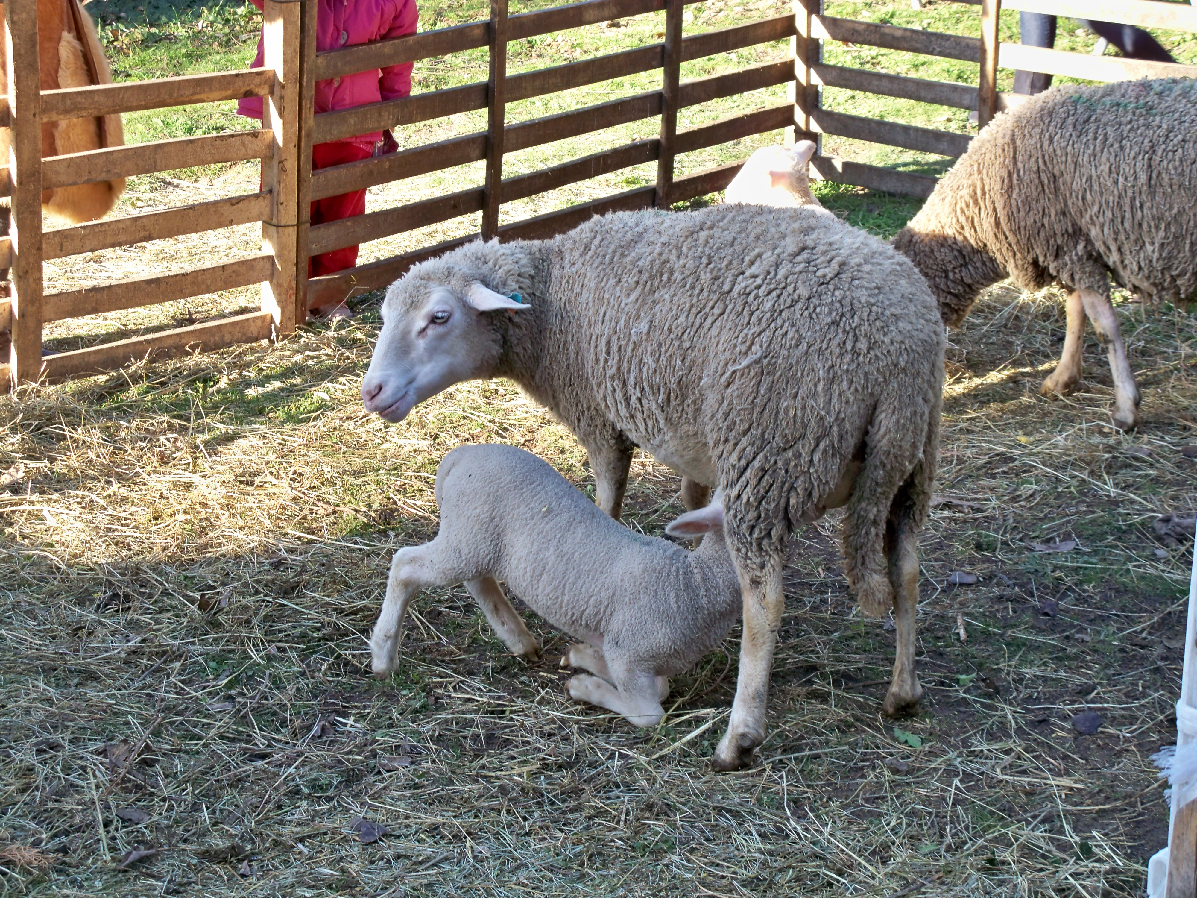 Agneau élevé sous la mère, en Provence